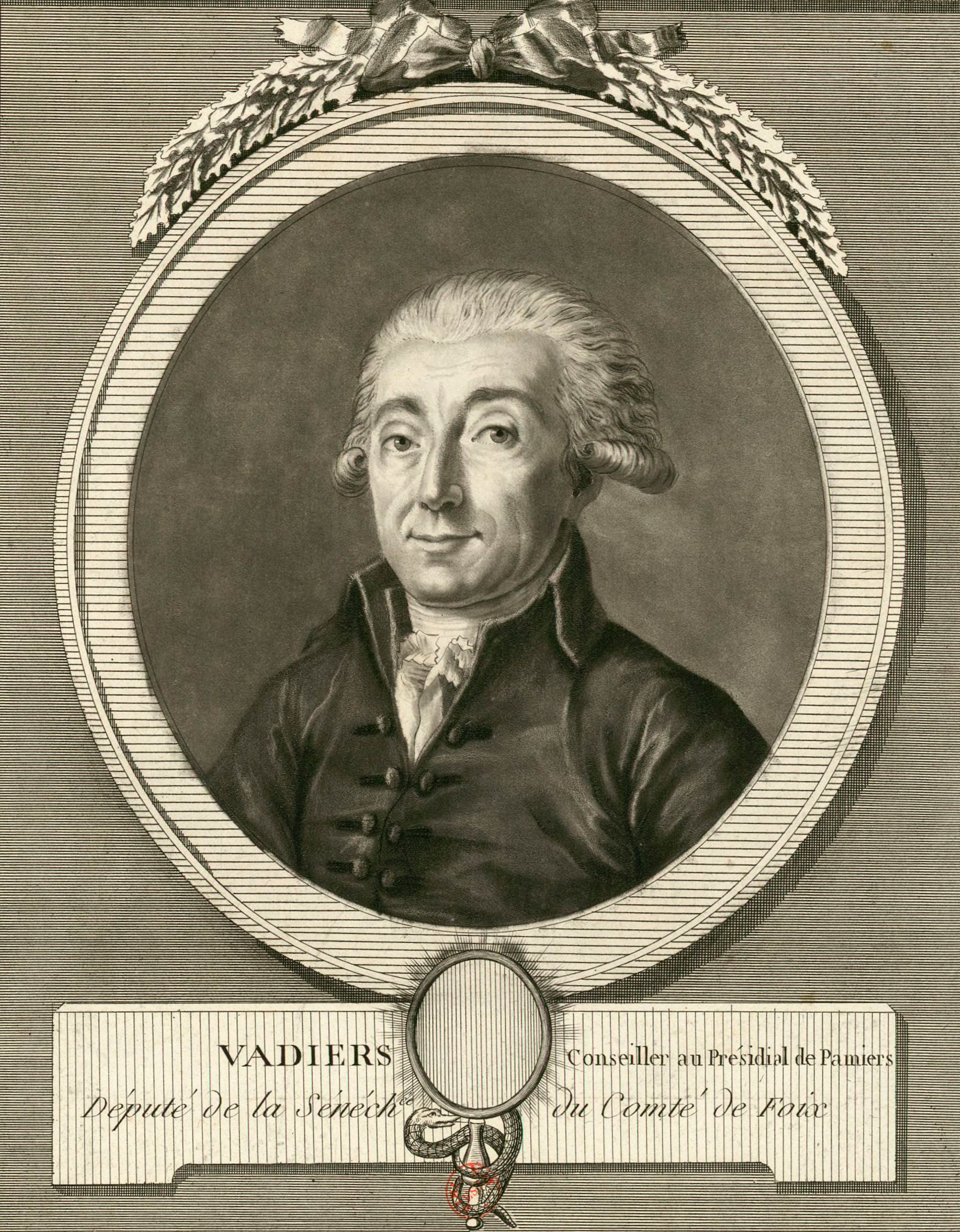 Marc-Guillaume-Alexis Vadier (1736-1828), conseiller au présidial de Pamiers, député du comté de Foix aux États généraux de 1789 (estampe).